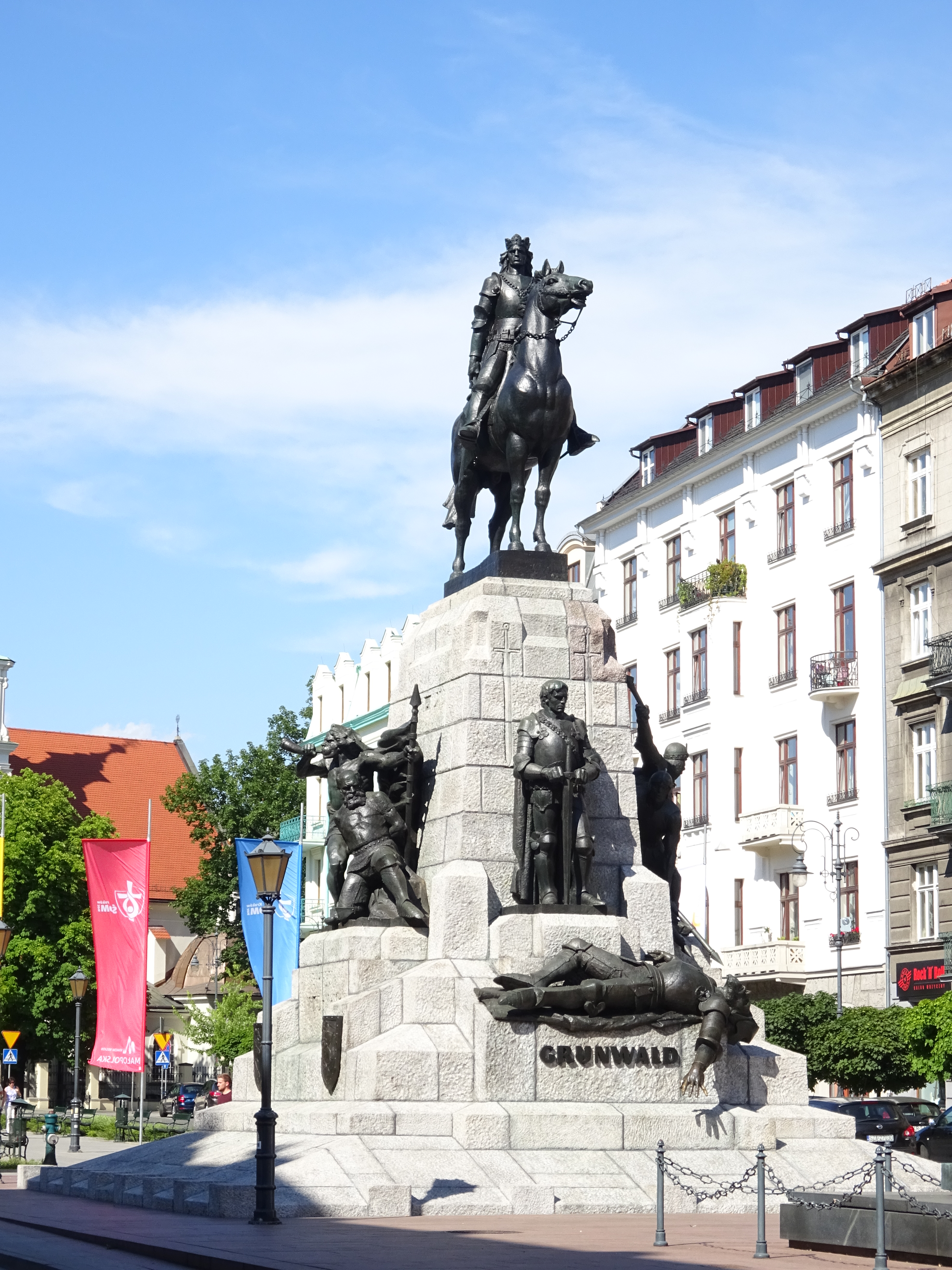 Pomnik Grunwaldzki w Krakowie, widok z profilu. Plac Jana Matejki.